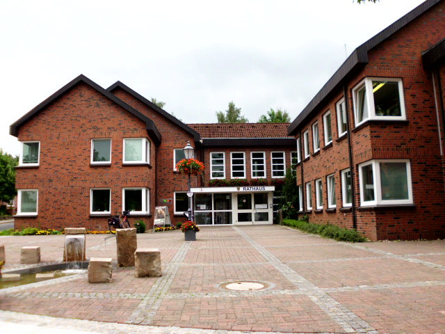 Salzhäuser Rathaus